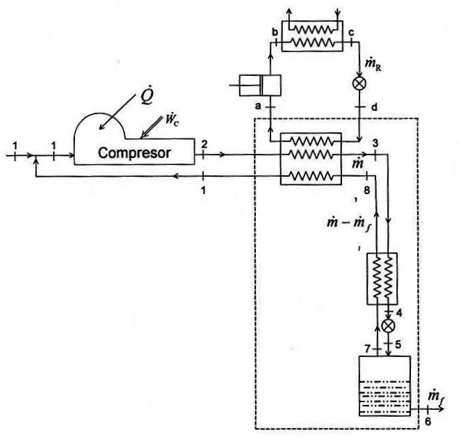 Diagrama de una planta de licuación de gases usando el sistema Linde con enfriamiento previo